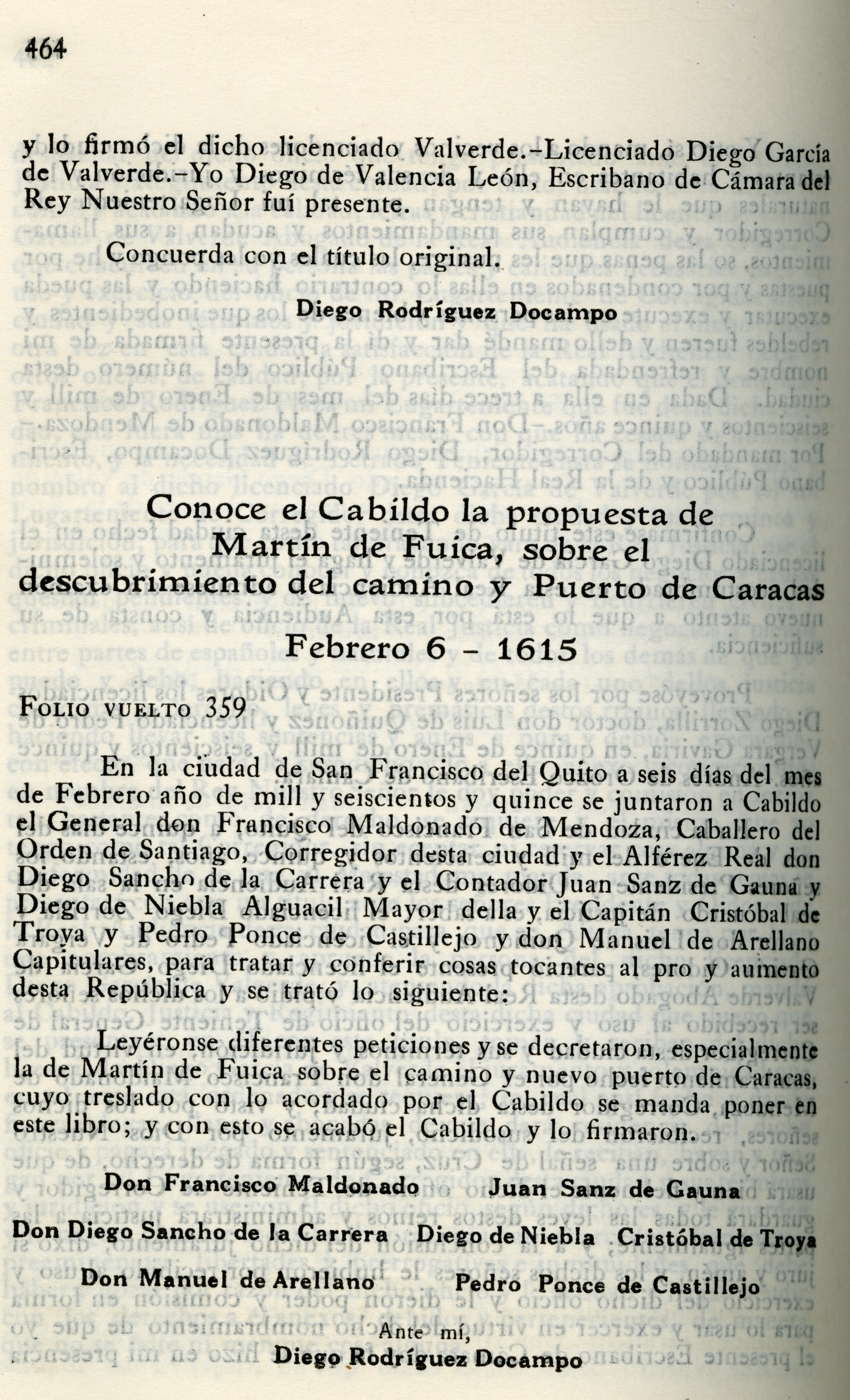 Cabildo celebrado el 5 de Febrero de 1615 en la ciudad de San Francisco de Quito, competente al Corregimiento que sesionaba en la misma ciudad, de lo cual tratose la autorización para se construyese desde allí hasta la Bahía de Caráquez un nuevo camino, a seis leguas de Puerto Viejo y limitante con el Corregimiento de Guayaquil.